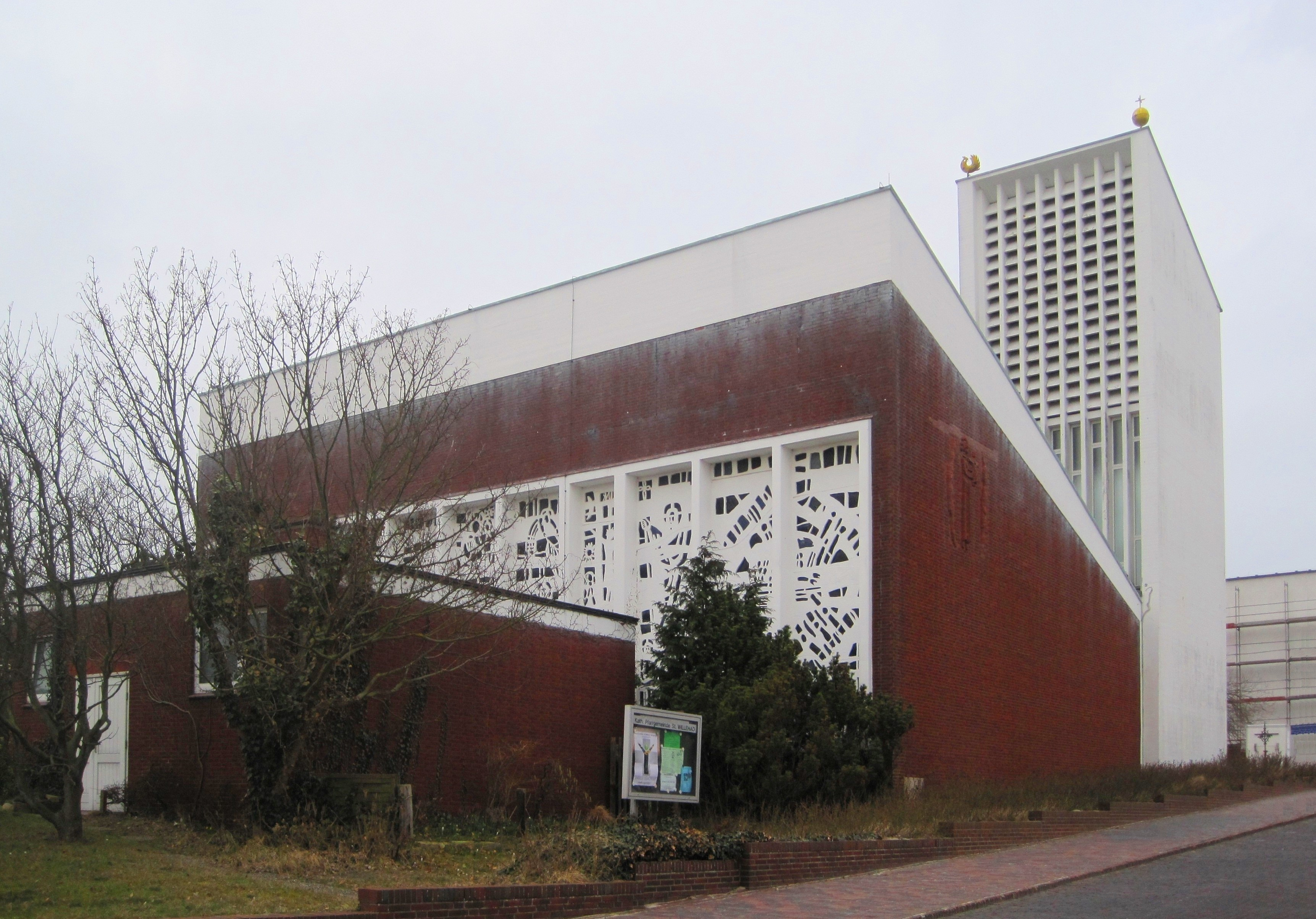 Kath. Kirche St. Willehad, Wangerooge